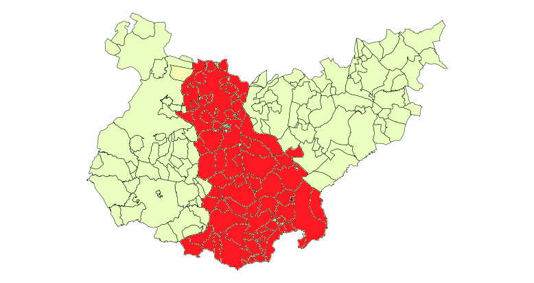 Territorio de la Diócesis del Priorato de San Marcos de León en la provincia de Badajoz (España)